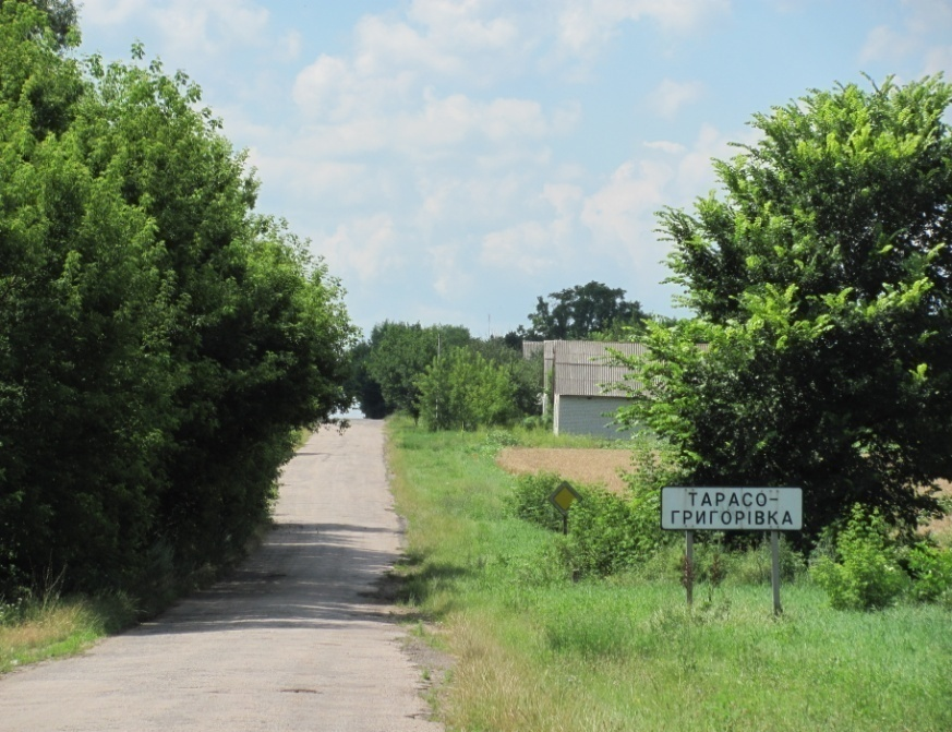 На польових дослідженнях